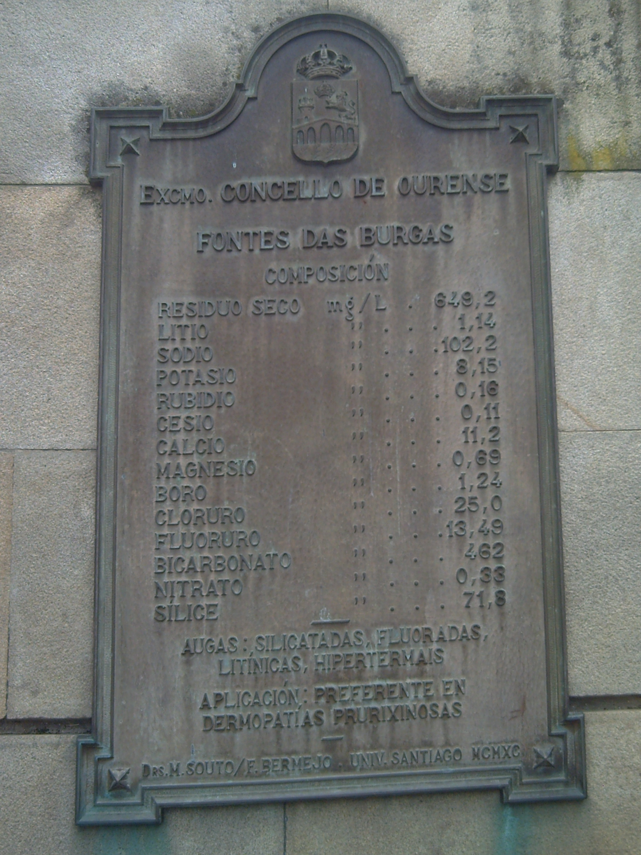 Composición química das Burgas, Ourense